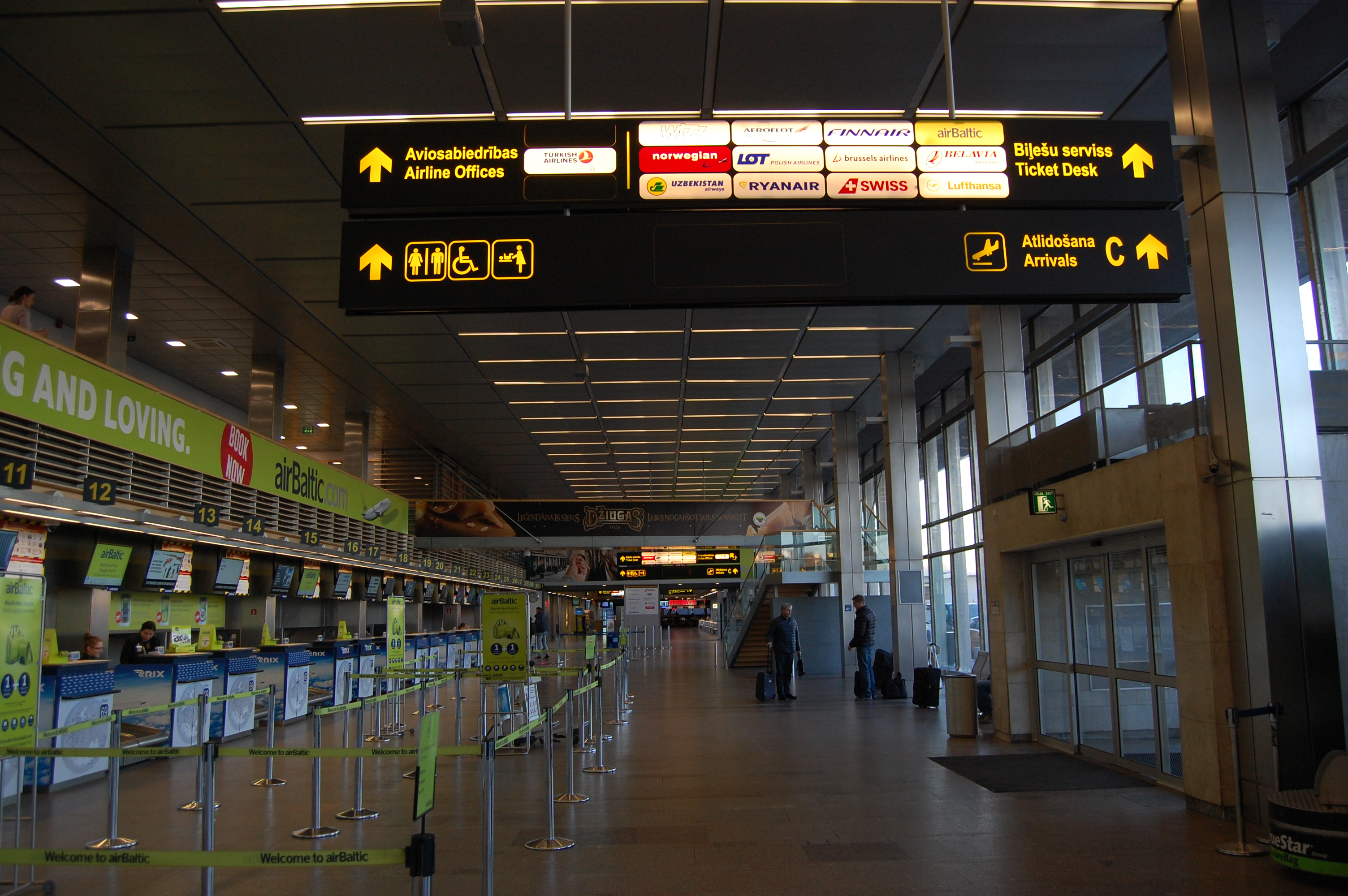 Lētākie lidojumi superbiletes.lv Rīgas lidostas dzīve žurnālistu acīm, 2015.